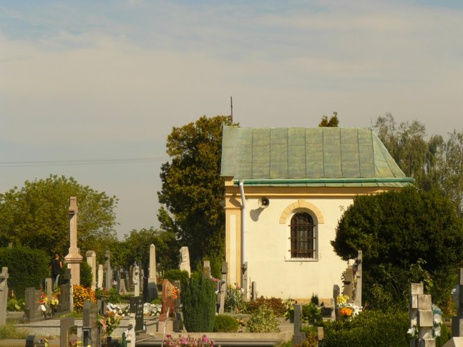 Rodinná krypta Godinovcov